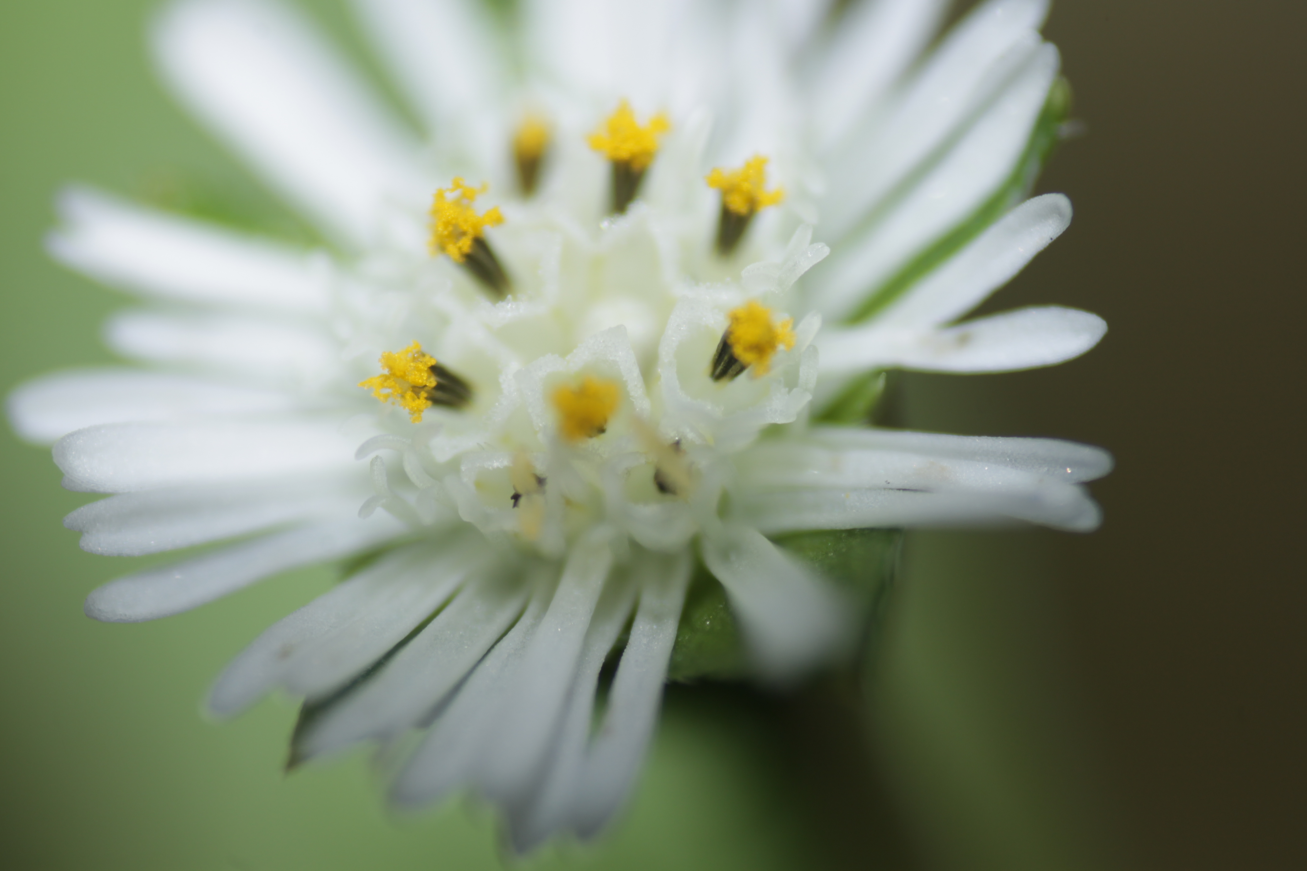 കയ്യോന്നിയുടെ പൂവ് - മാക്രോ ഫോട്ടോഗ്രാഫി